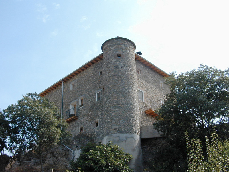 Vista del torreón circular adosado en una esquina de la casa fortificada